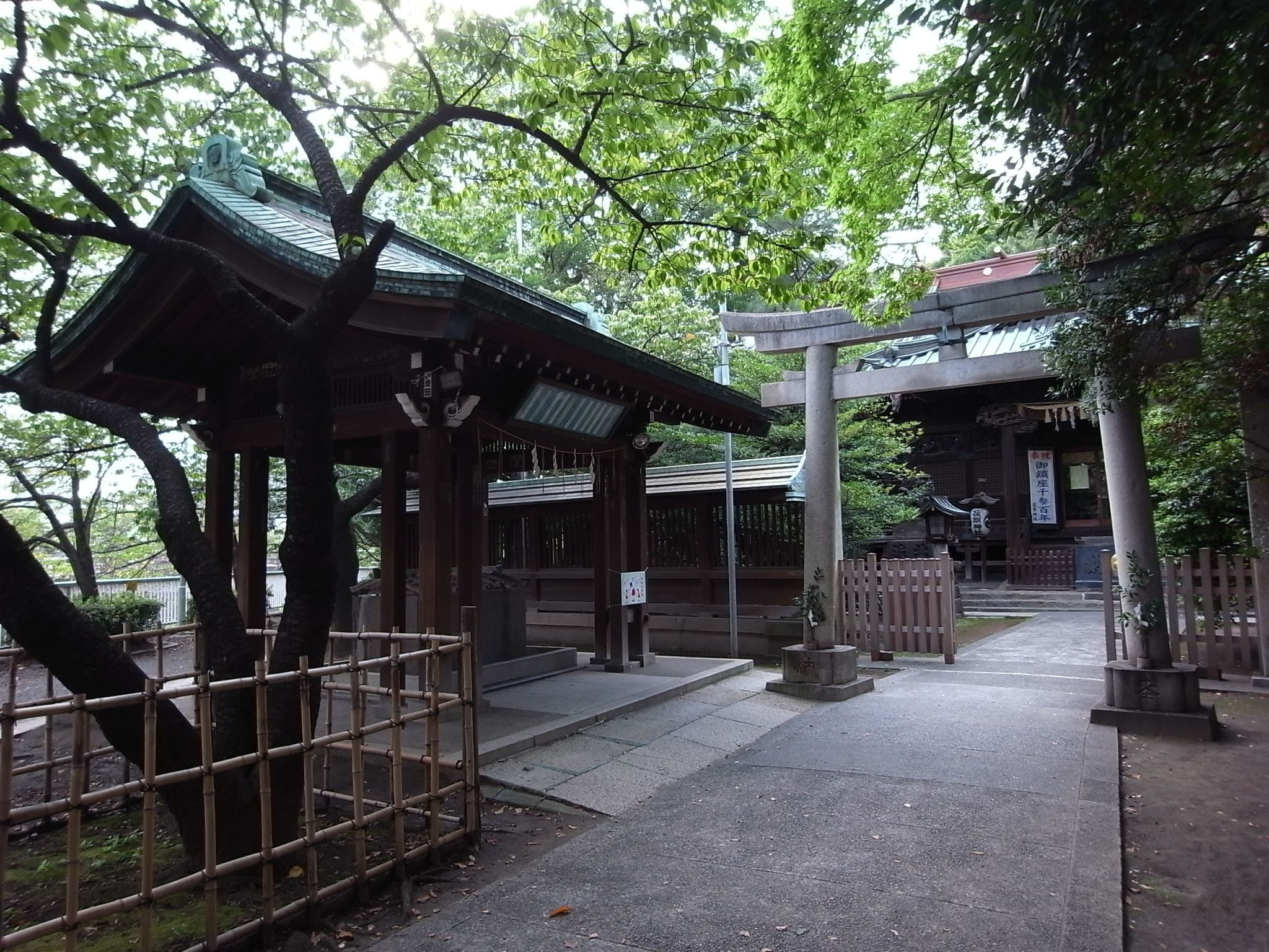 荏原神社 参道